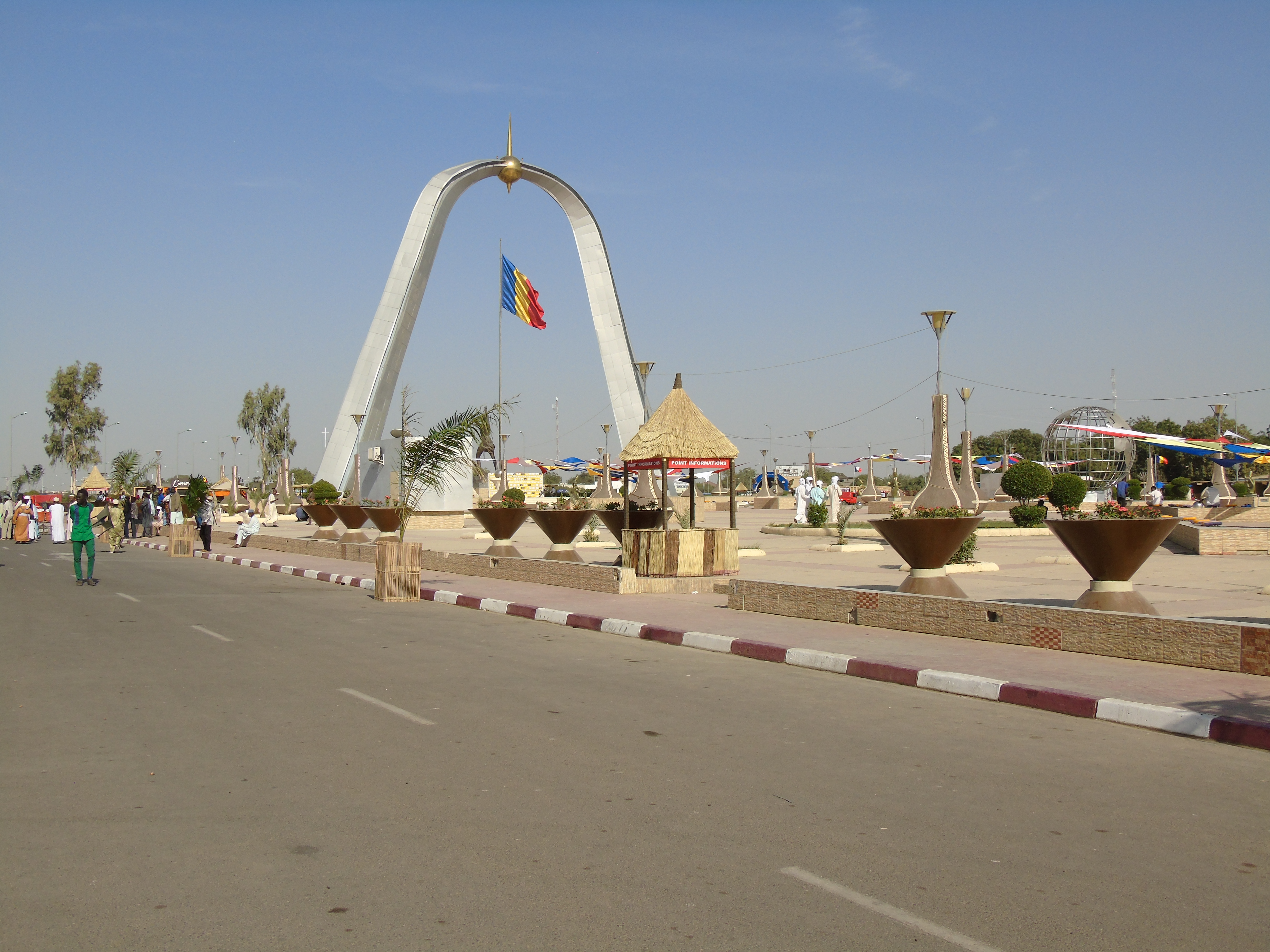 Place de la nation lors du festival Dary édition 2018